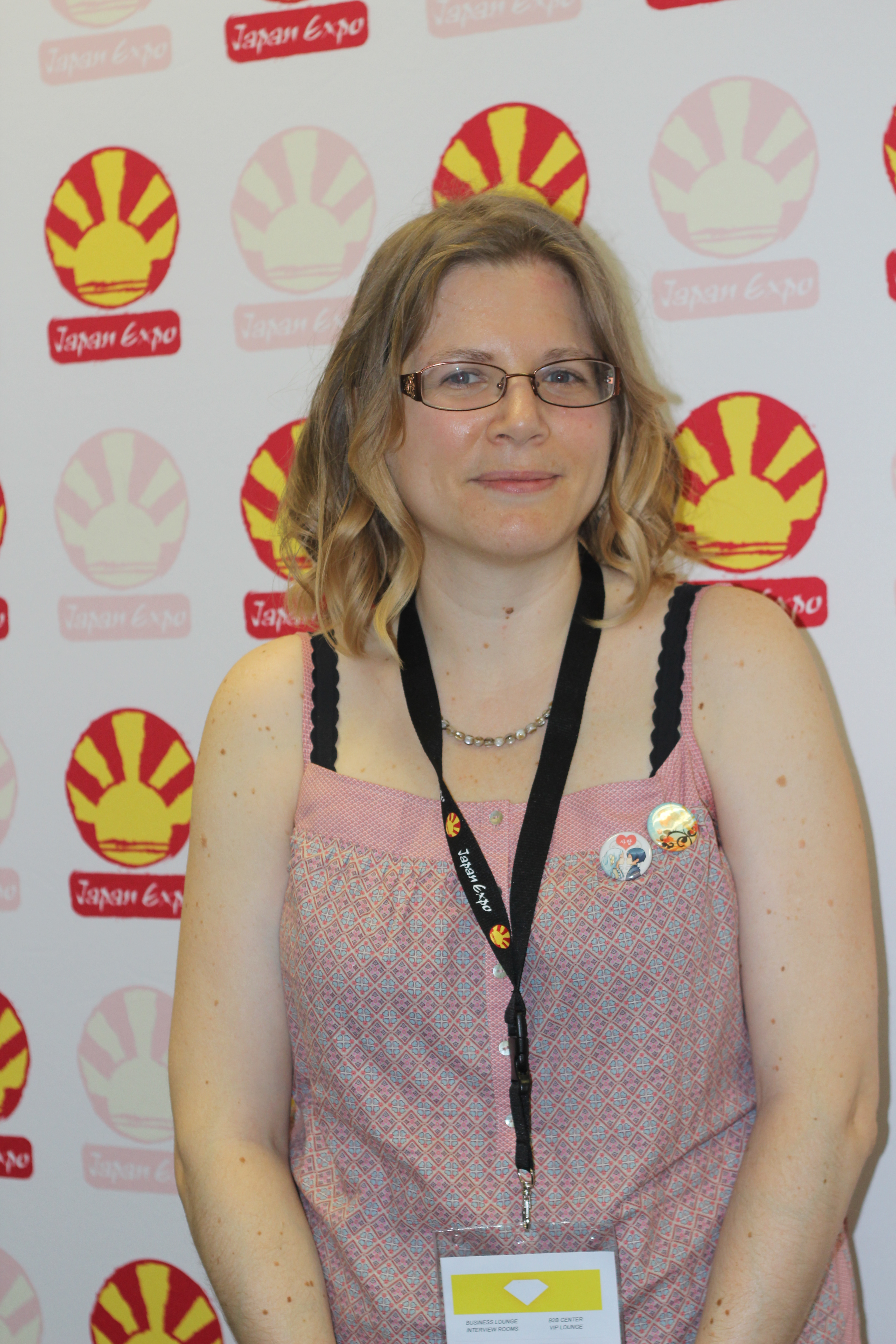 Aurore, auteure des affiches de la Japan Expo Japan Expo 2014. Parc des expositions de Paris-Nord Villepinte, Seine-Saint-Denis, France.